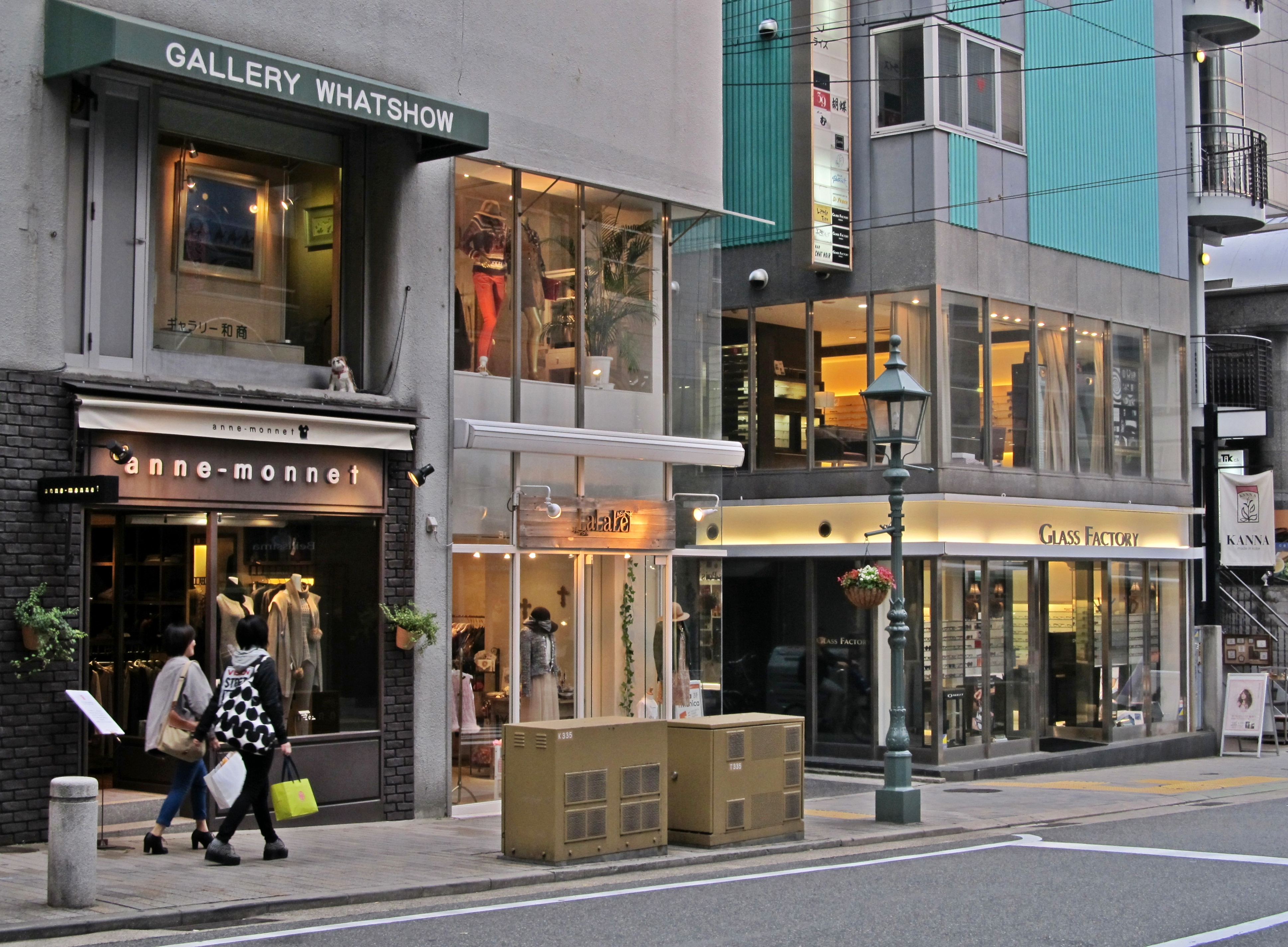 トアイースト。トアロード東側の商業地域。（兵庫県神戸市中央区北長狭通2丁目）